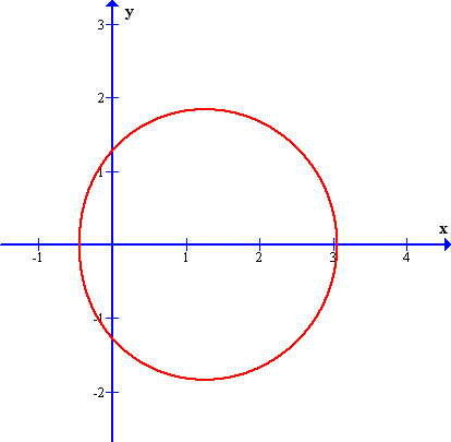 Owal Kartezjusza o parametrach: a = 1, b = 1, c = 1